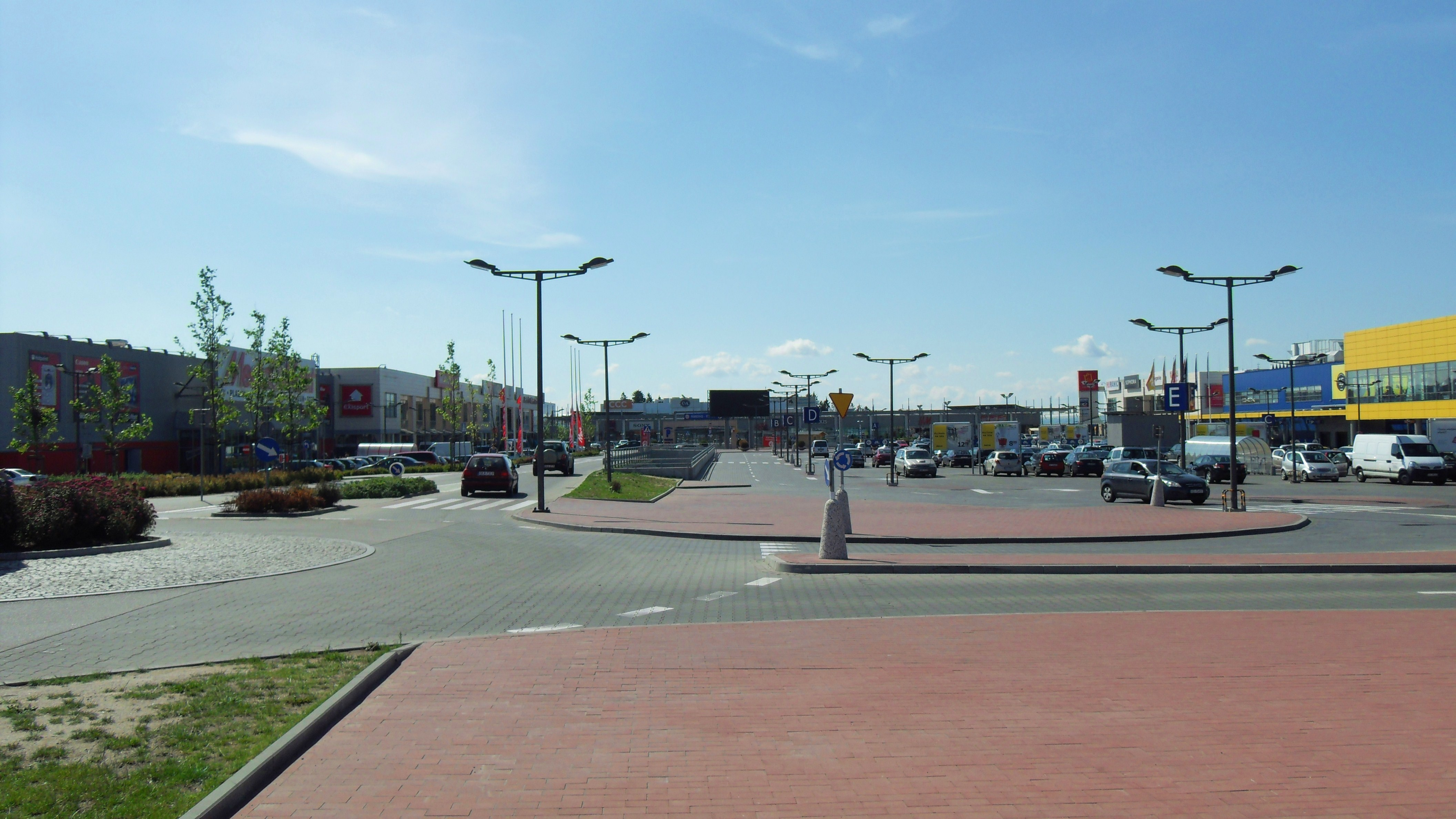 Gdańsk Złota Karczma, Park Handlowy Matarnia. Po prawej IKEA.